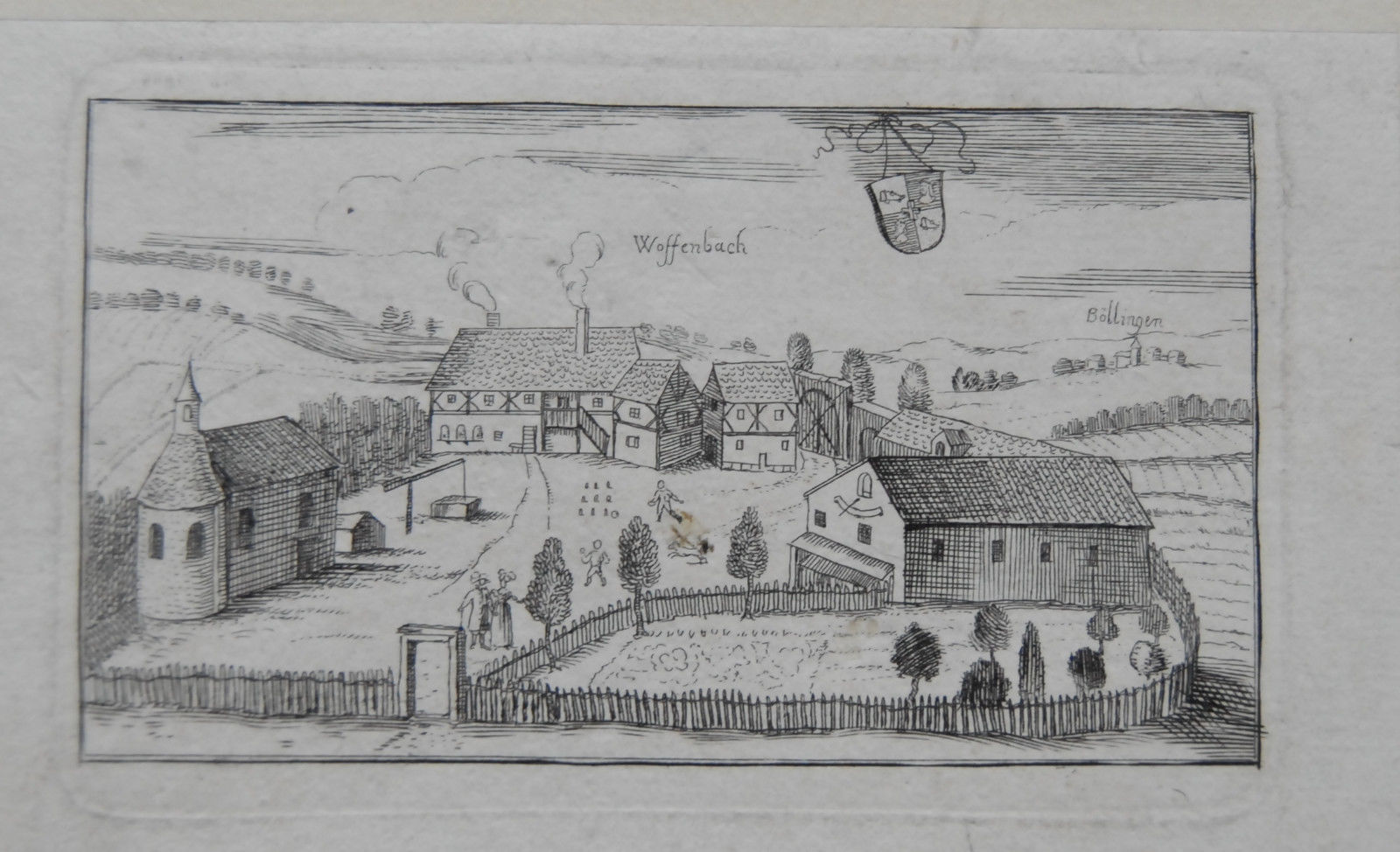 Das Woffenbacher Schloss / Edelmannshof um das Jahr 1850